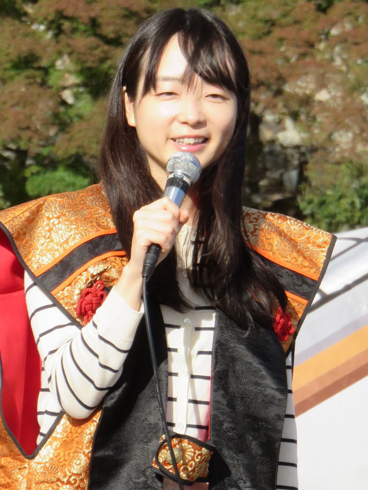 将棋棋士の室田伊緒（平成２９年１１月、姫路市で行われた人間将棋にて）